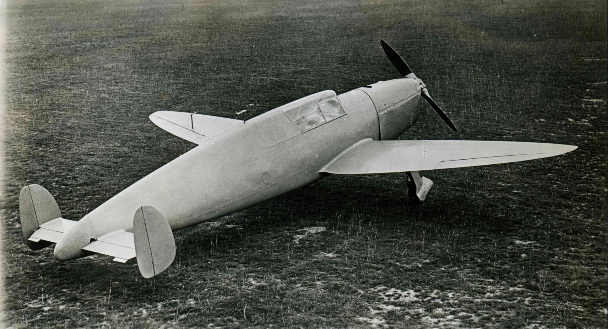 Foto der Fieseler Fi 158, ein Versuchsflugzeug als freitragender Tiefdecker in Holzbauweise ausgeführt. Sehr gute aerodynamische Formgebung dadurch hohe Geschwindigkeit bei geringer Motorleistung. Einziehfahrwerk. Ein Pilotensitz in geschlossener Kabine. Motor: Hirth HM 506 mit 160 PS. Entwickelt und gebaut bei dem Fieseler Flugzeugbau Kassel.